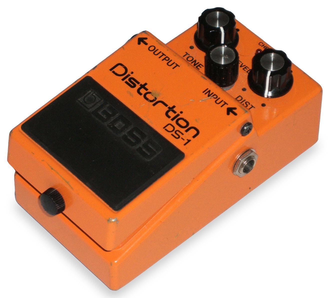 A BOSS DS-1 guitar distortion pedal